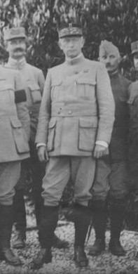 le général jean de Mondésir pendant la Première Guerre mondiale.